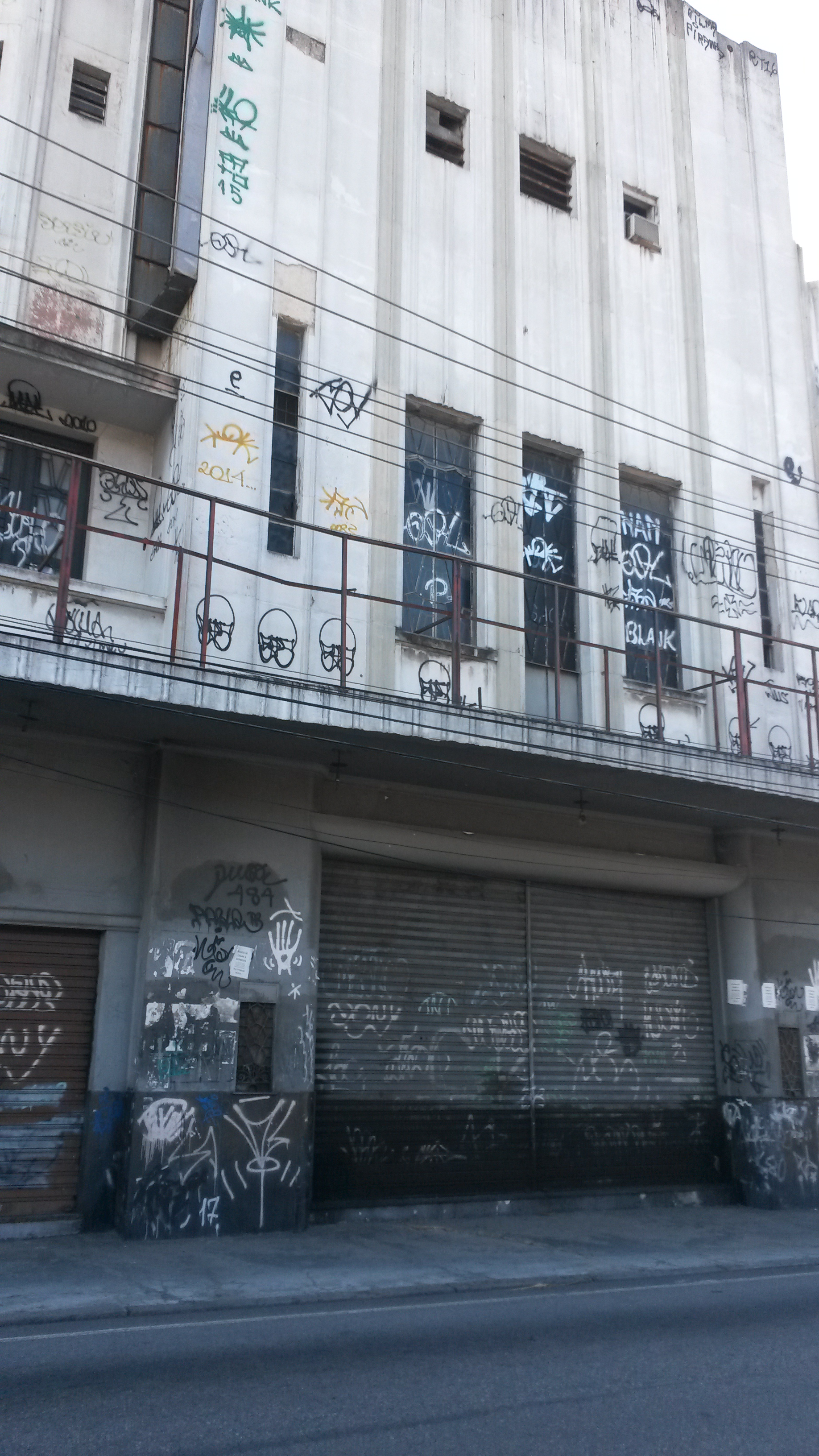 Fachada do Cine Rosário, no bairro de Ramos, RIo de Janeiro